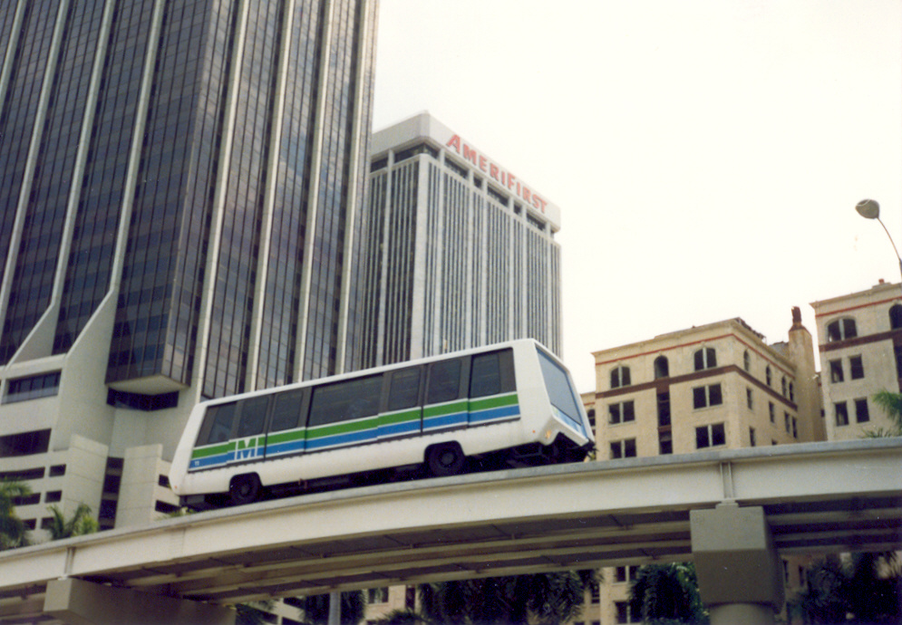 Miami